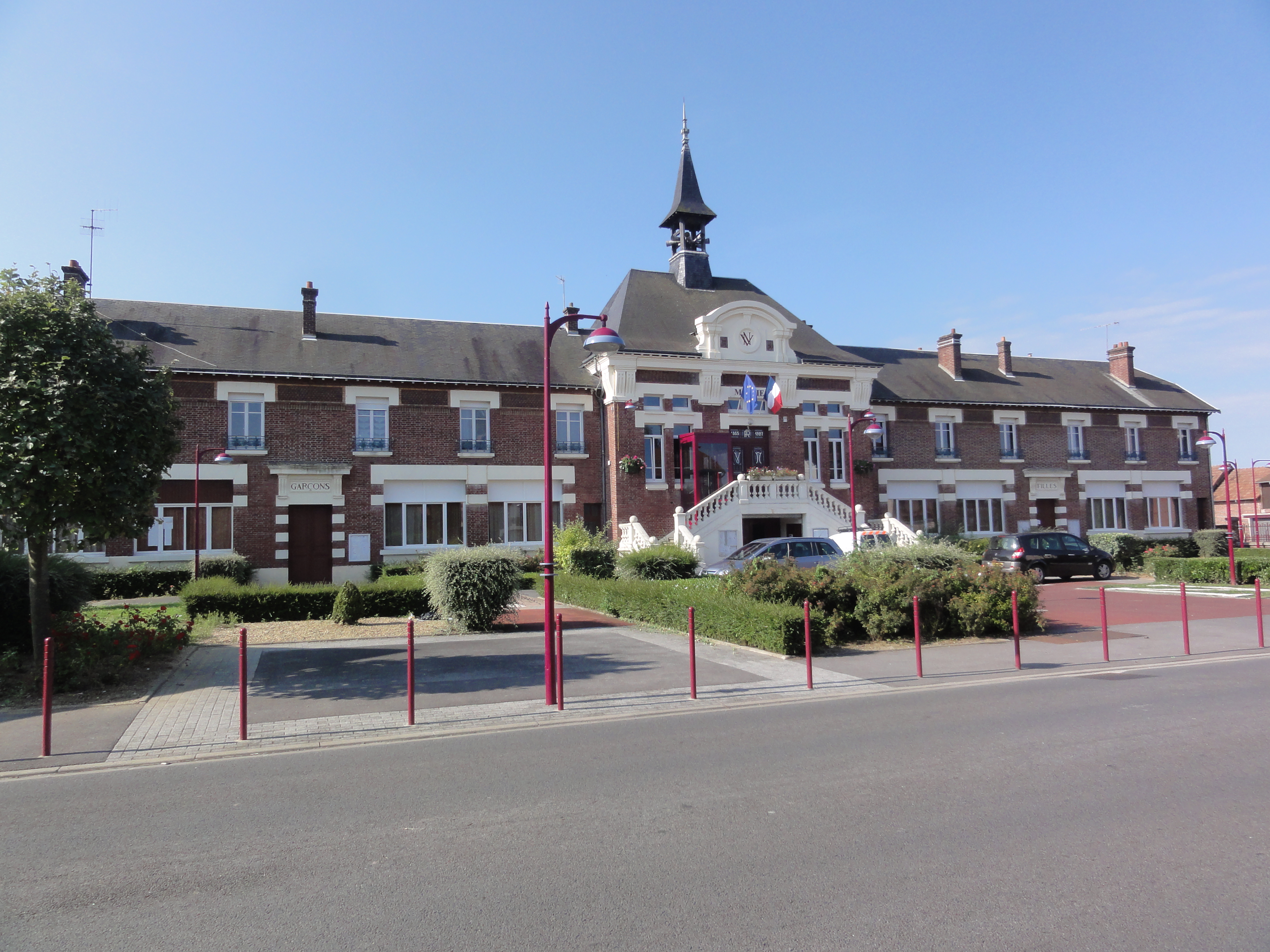 Viry-Noureuil (Aisne) mairie-école